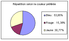 Exemple de diagramme en camembert. Image personnelle créée à l'aide d'un tableur.